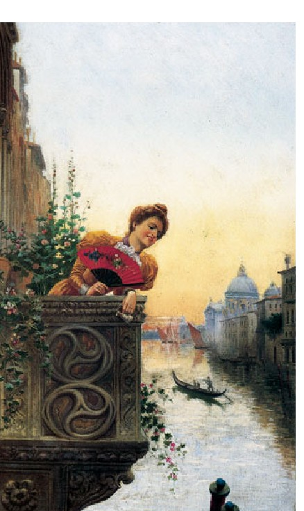 “Venecia (dama con abanico en el balcón)”, Jose Etxenagusiarena.